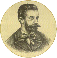 Arany László (1844–1898) költő, népmesegyűjtő. Korabeli fénykép